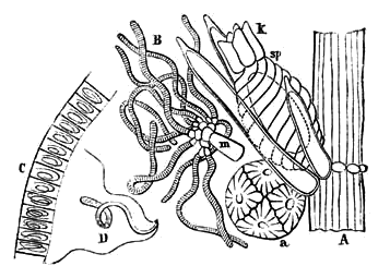 Fortpflanzungsorgane der Characeen